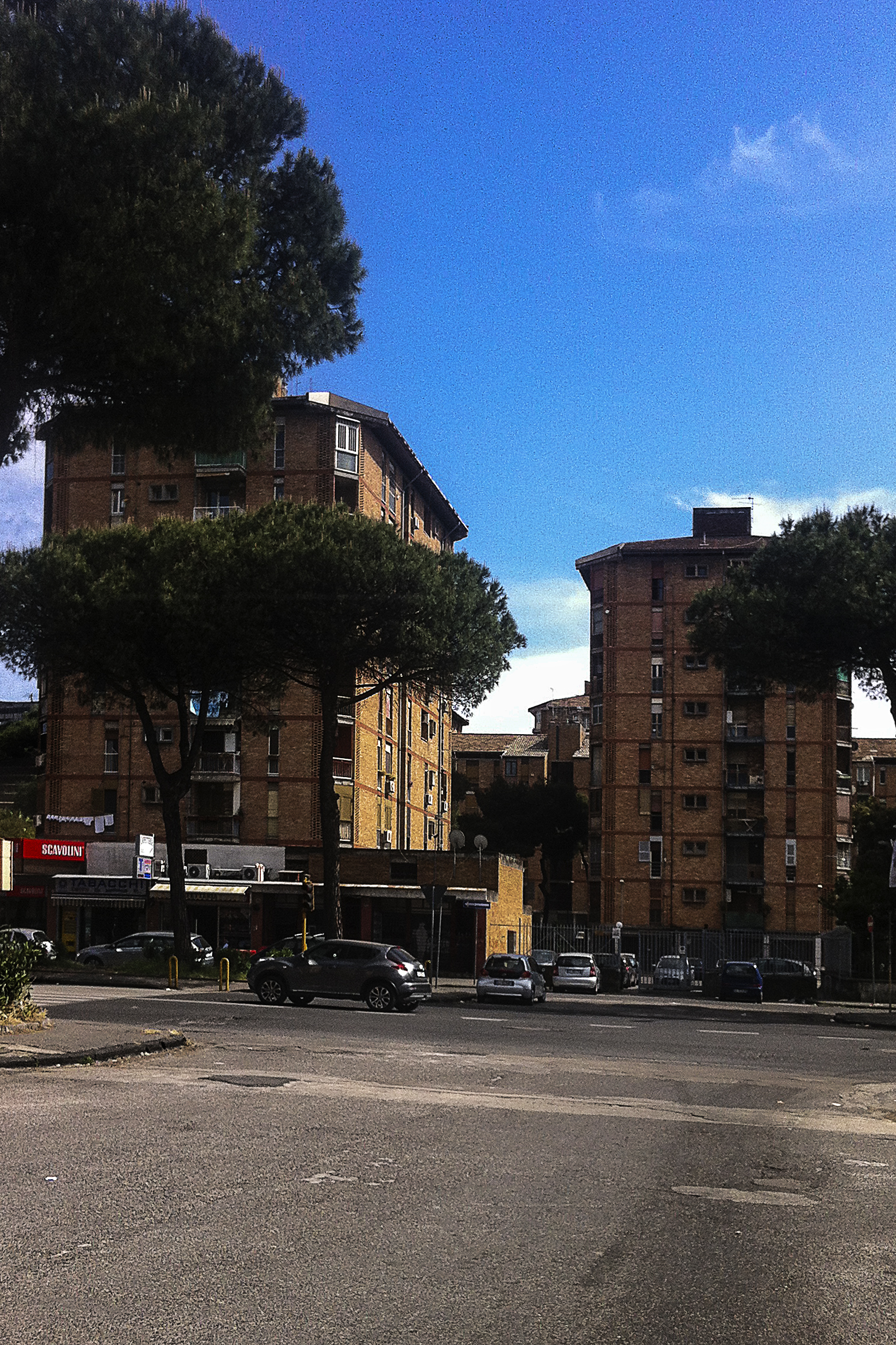 Scorcio del Rione Traiano con edifici a Torre.